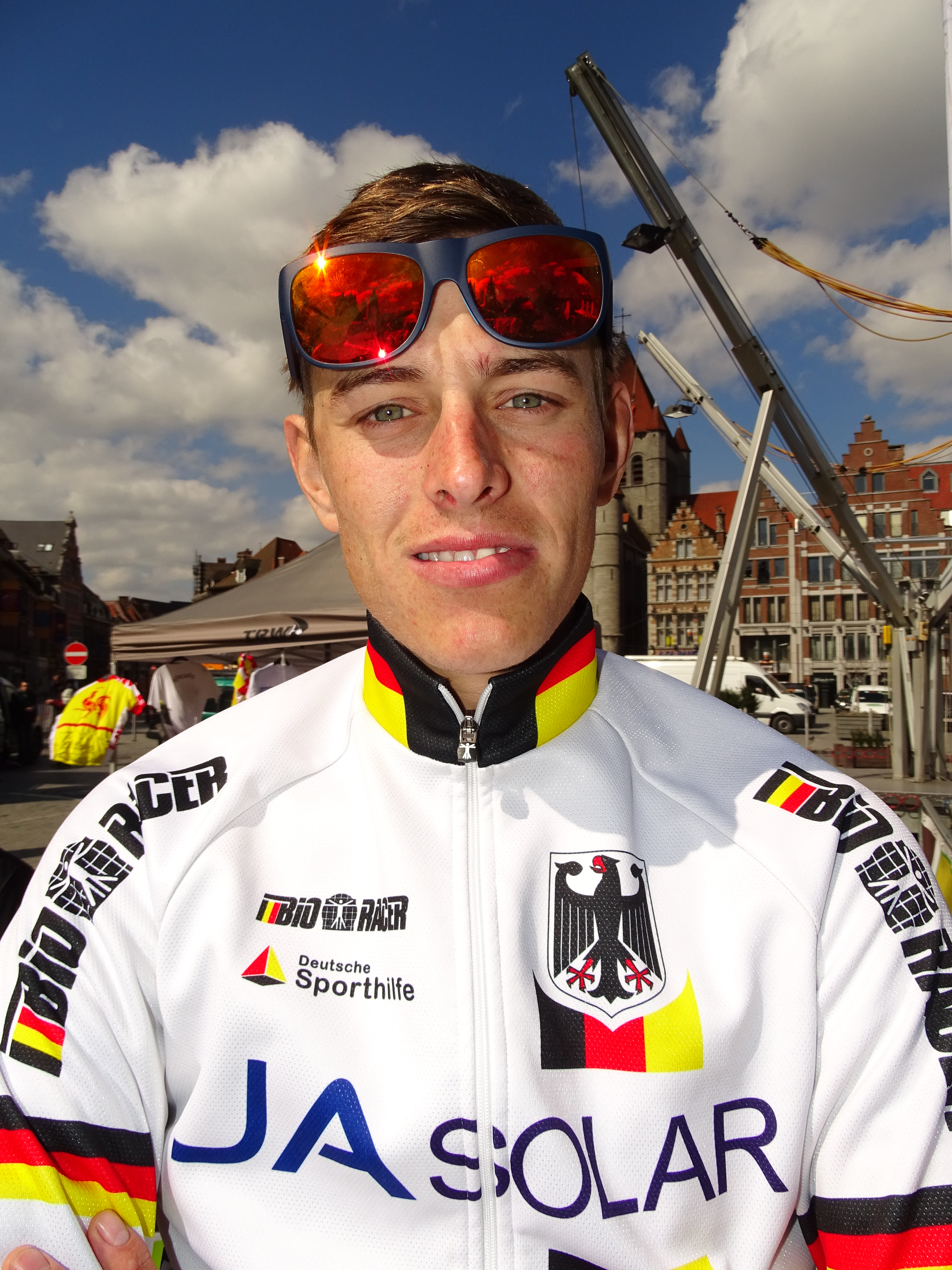 Triptyque des Monts et Châteaux 2015 Depicted person: Nils Politt Depicted team: Équipe nationale d'Allemagne espoirs